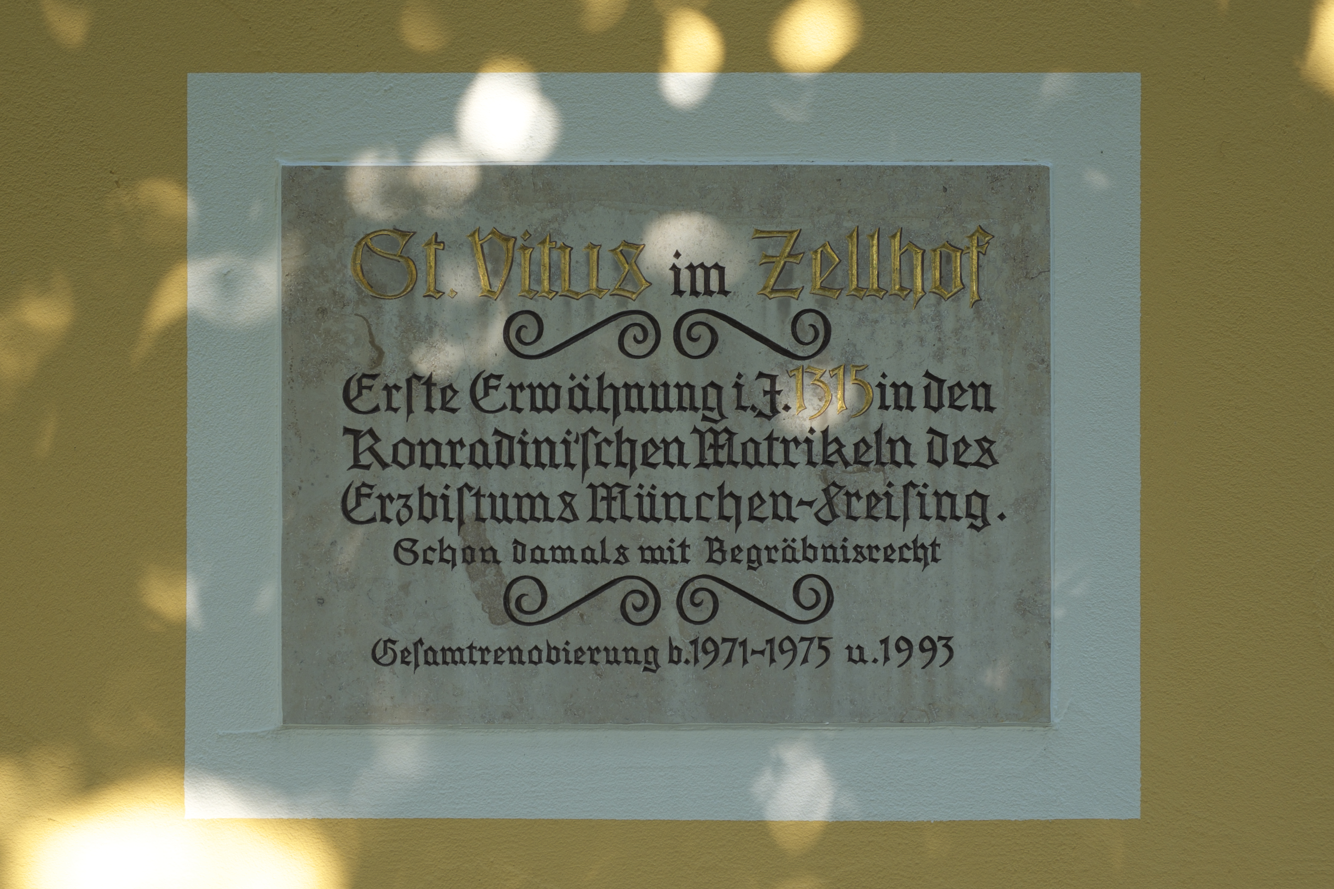 Katholische Kapelle St. Vitus in Zellhof (Schöngeising) im Landkreis Fürstenfeldbruck (Bayern/Deutschland)